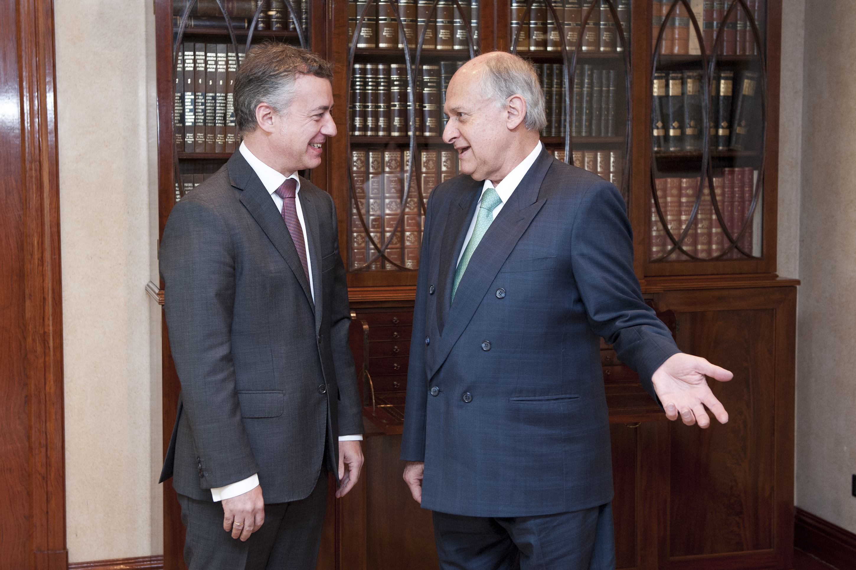 El Lehendakari recibe a Manuel Patarroyo